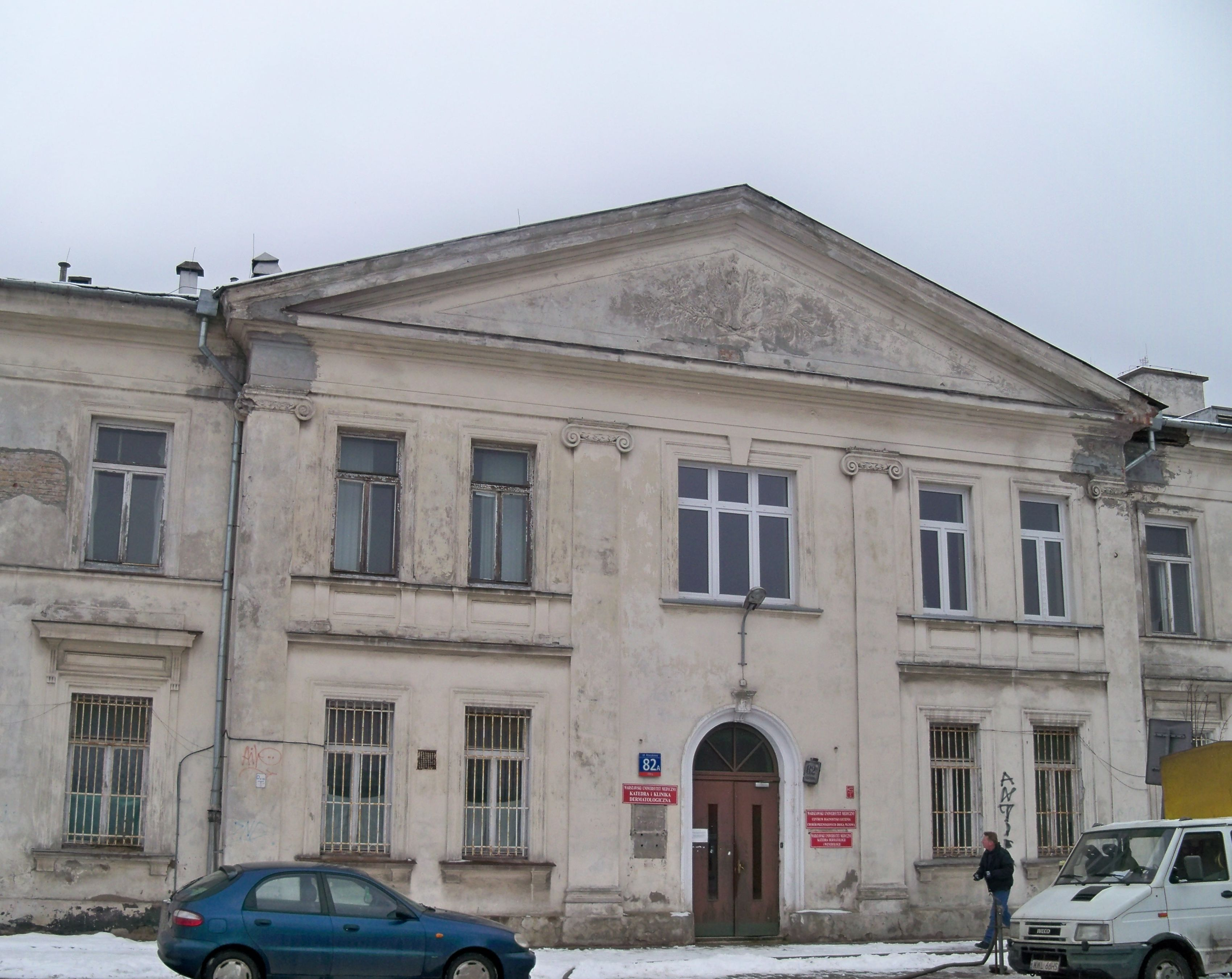 Katedra Dermatologii i Wenerologii/Katedra i Klinika Dermatologiczna Warszawskiego Uniwersytetu Medycznego / Klinika Chorób Wenerycznych Szpitala Klinicznego Dzieciątka Jezus, ulica Koszykowa 82 a w Warszawie.